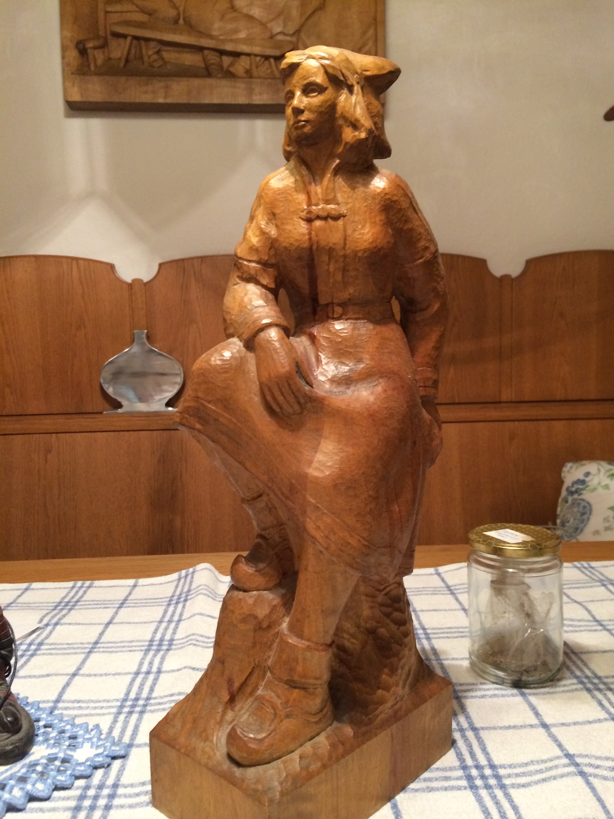 Lappin auf Sockel, Holzplastik, Höhe 48 cm, 1948, Bes.: M. Eder